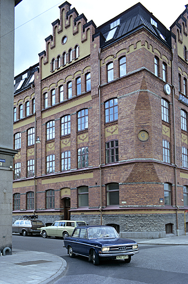 Husfasad i nyrenässans. Motiv: Göteborg Nyckelord: Riksintressen Kategori: Stadsmiljö Örebro Skofabrik i hörnet Järnvägsgatan / Klostergatan i Örebro (ej Göteborg)